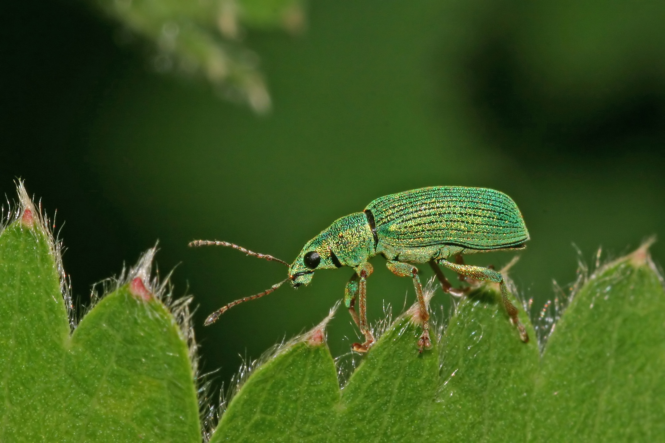 Seidiger Glanzrüssler Polydrusus formosus. Please see note on talk page before re-naming this file